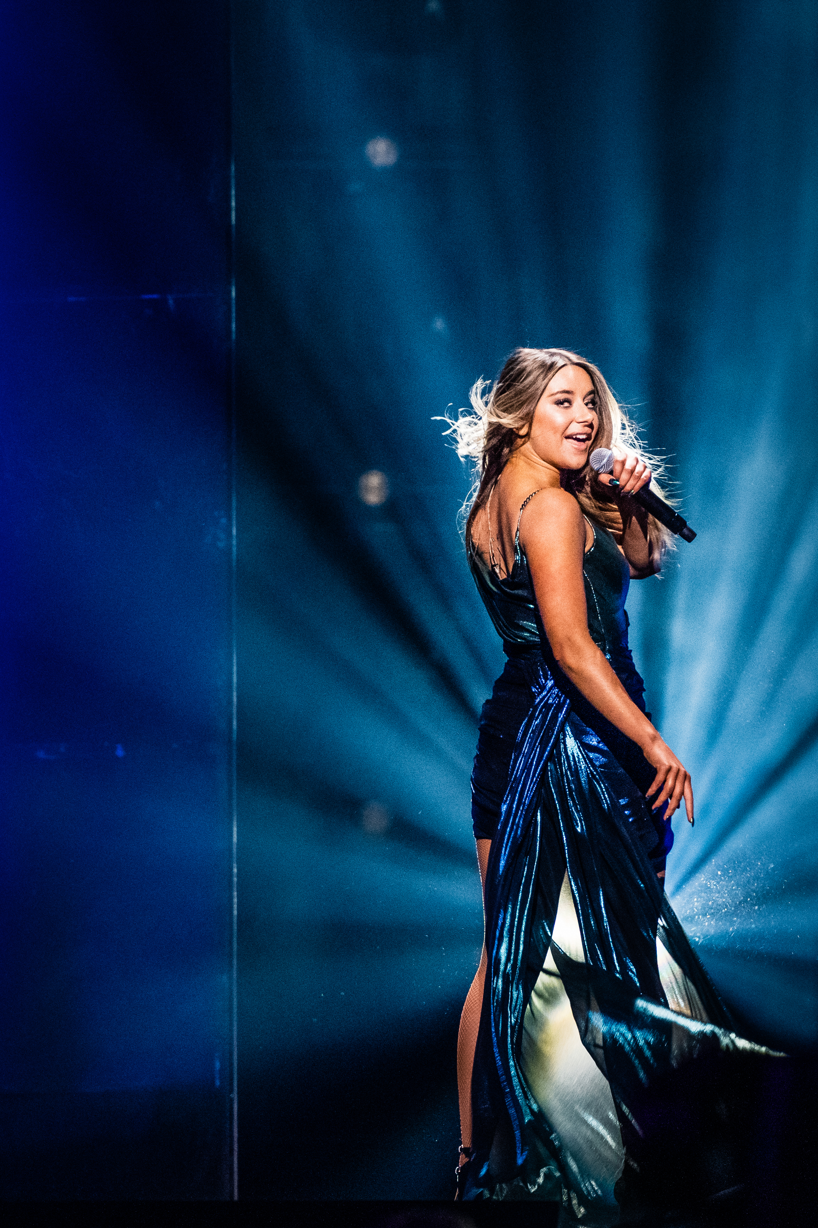 Hanna Ferm tittar bakåt när hon avslutar sitt bidrag Brave i finalen i Melodifestivalen 2020 på Friends Arena